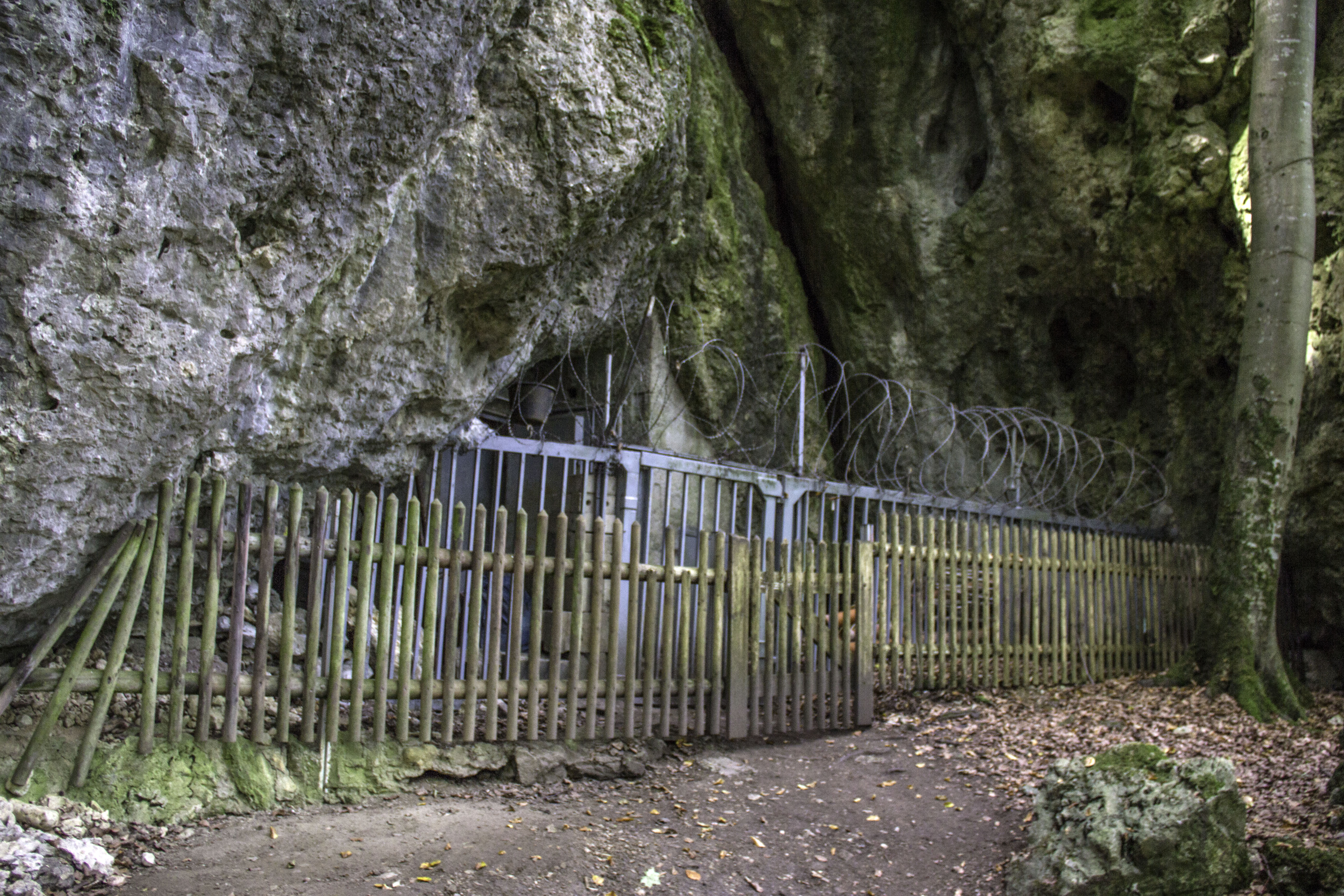 Zoolithenhöhle, D 109, Burggaillenreuth